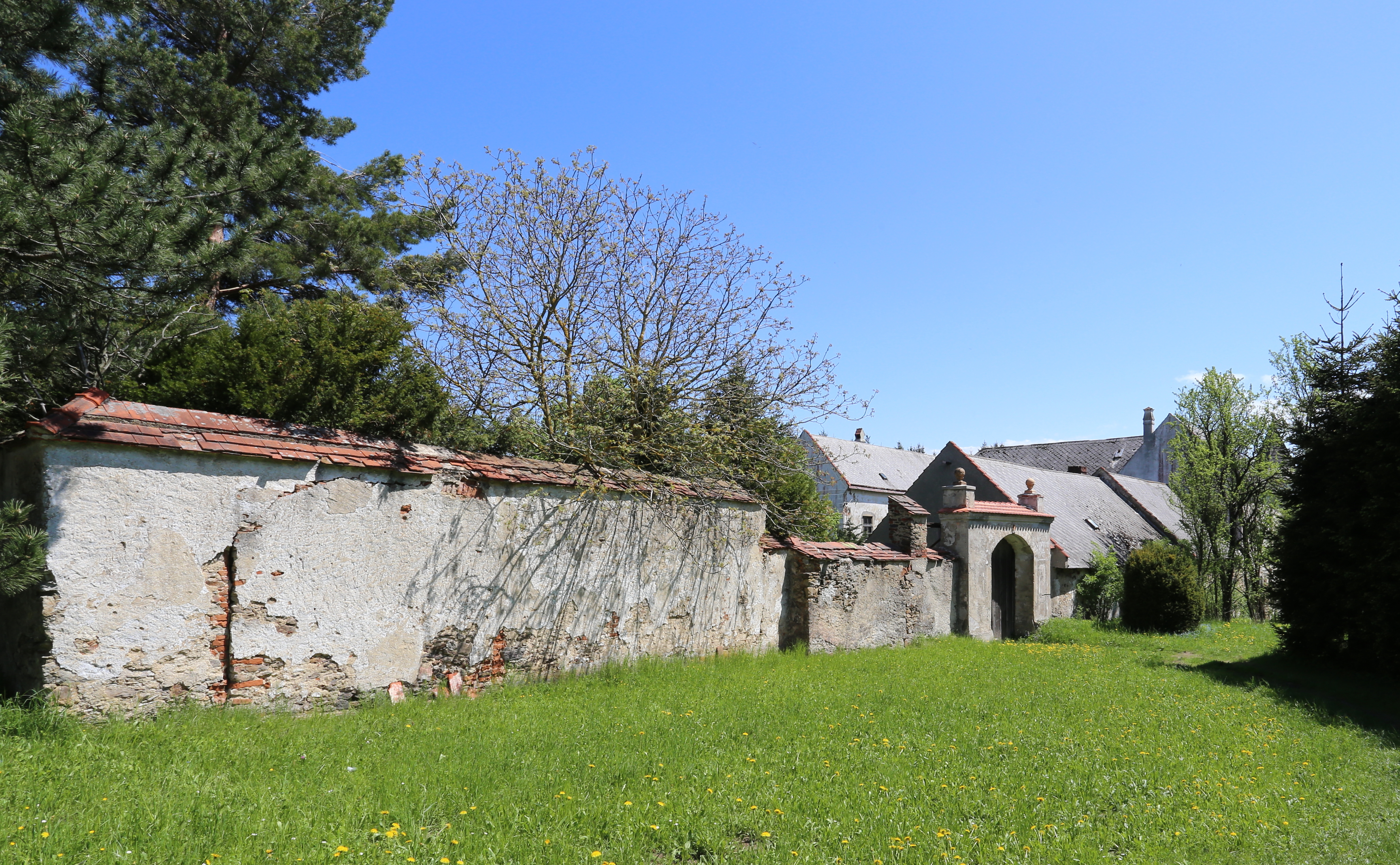 Westansicht des Schlosses in Arndorf, ein Ortsteil der niederösterreichischen Marktgemeinde Pöggstall. Der Gebäudekomplex ist von einer Mauer umlaufen. Das Rundbogenportal im Westen wurde im 18. Jahrhundert errichtet.